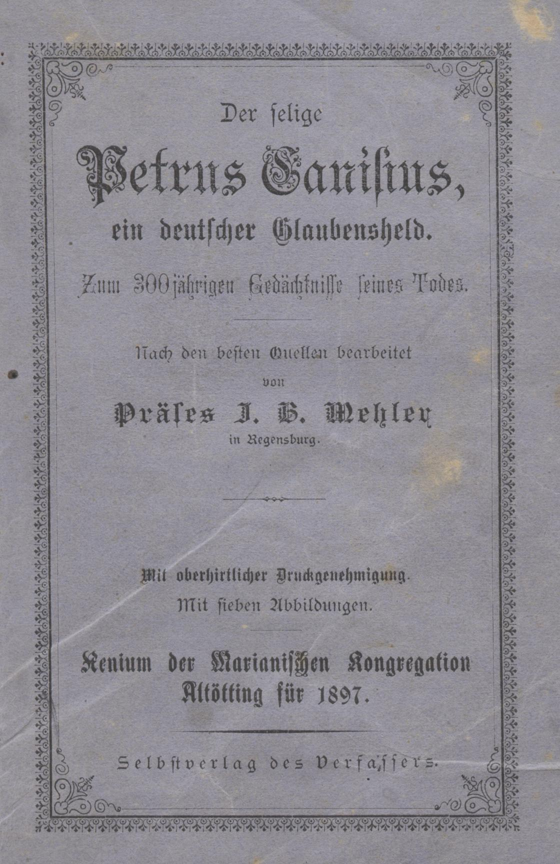 Johann Baptist Mehler, Buchtitel